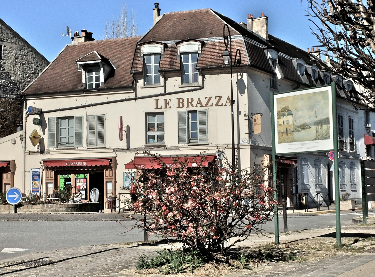 L'Inondation à Port-Marly 2013